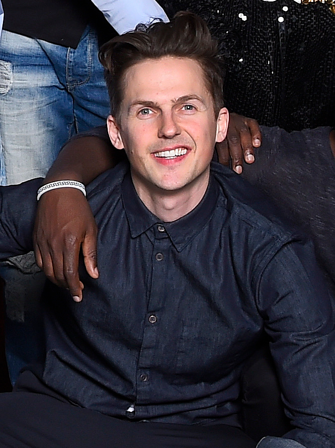 David Lindgren, in 2016.